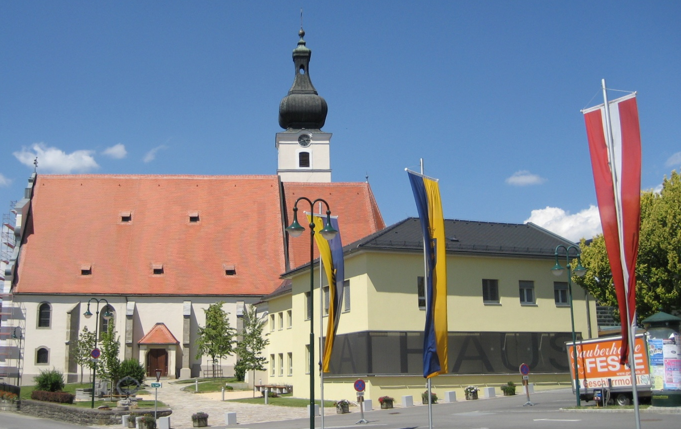 Kirche und Rathaus in Mank